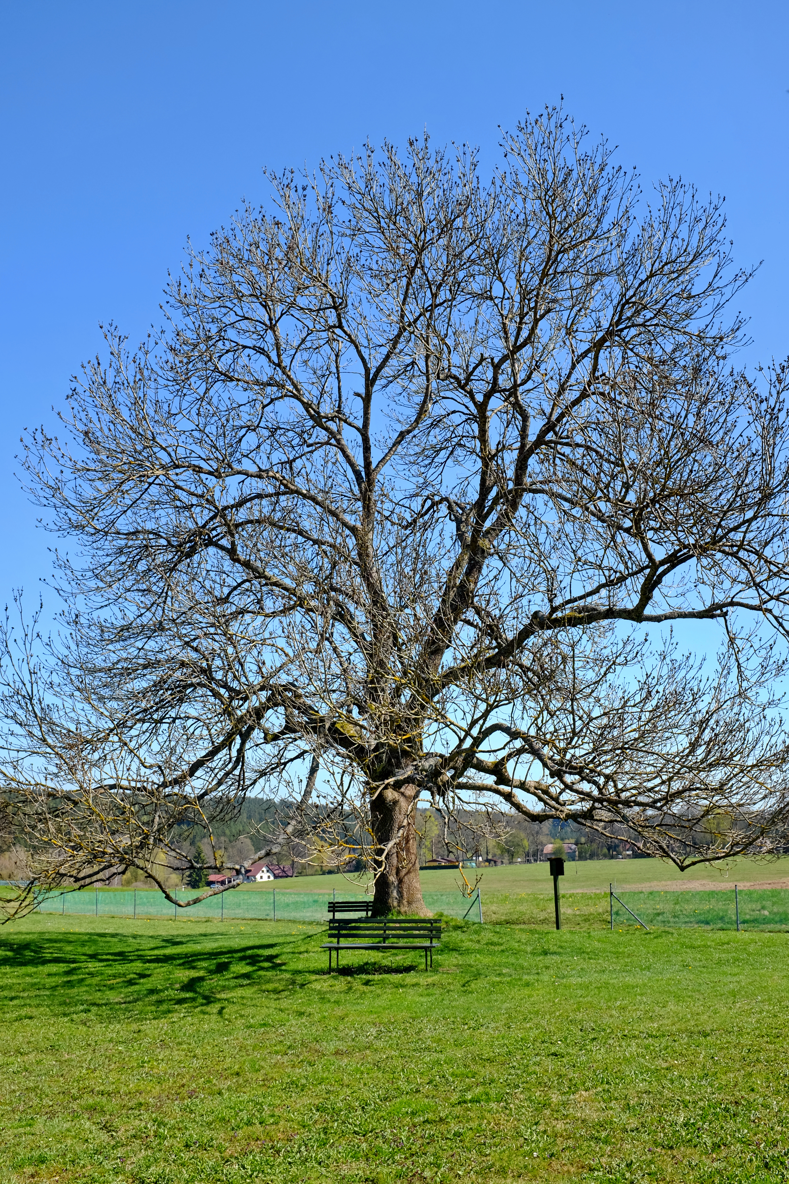 Významný strom - Jasan pana Šolce - Chodovská Huť, okres Cheb